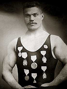 Verner Weckman